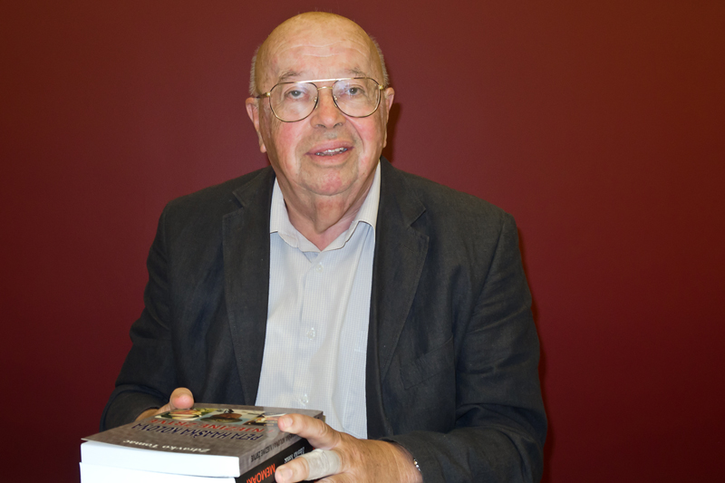 Predstavljanje knjiga »Tko mi zabranjuje kolumne?« novinara i publicista Tihomira Dujmovića, zajedno s »Memoarima« prof. dr. Zdravka Tomca